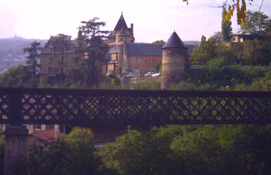 Le château de Rochetaillée vu de l'Est (au premier plan le viaduc du chemin de fer)